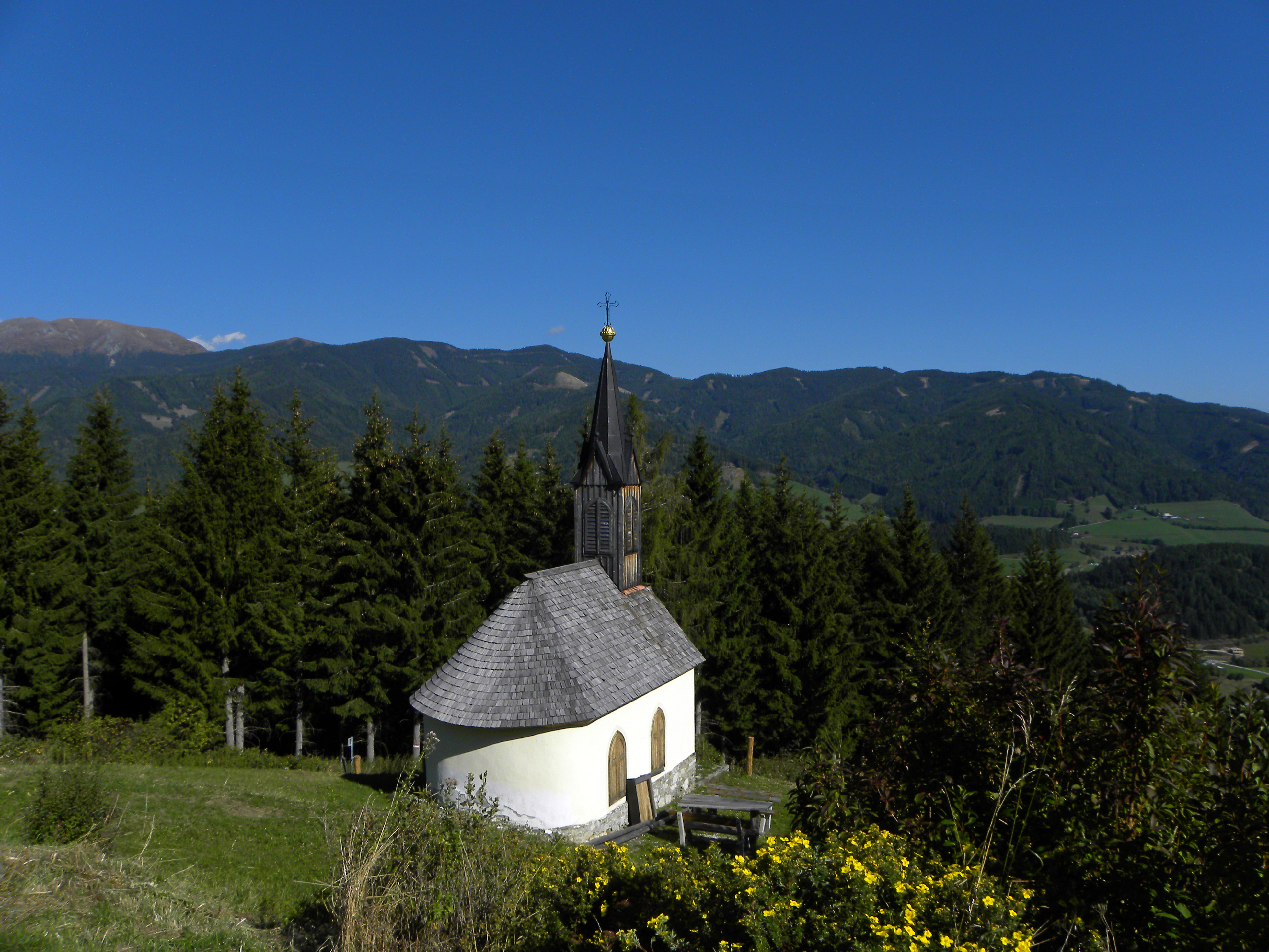 Schneebergkapelle